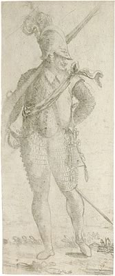 Dessin à la craie de Giovanni Contarini représentant un soldat en arme